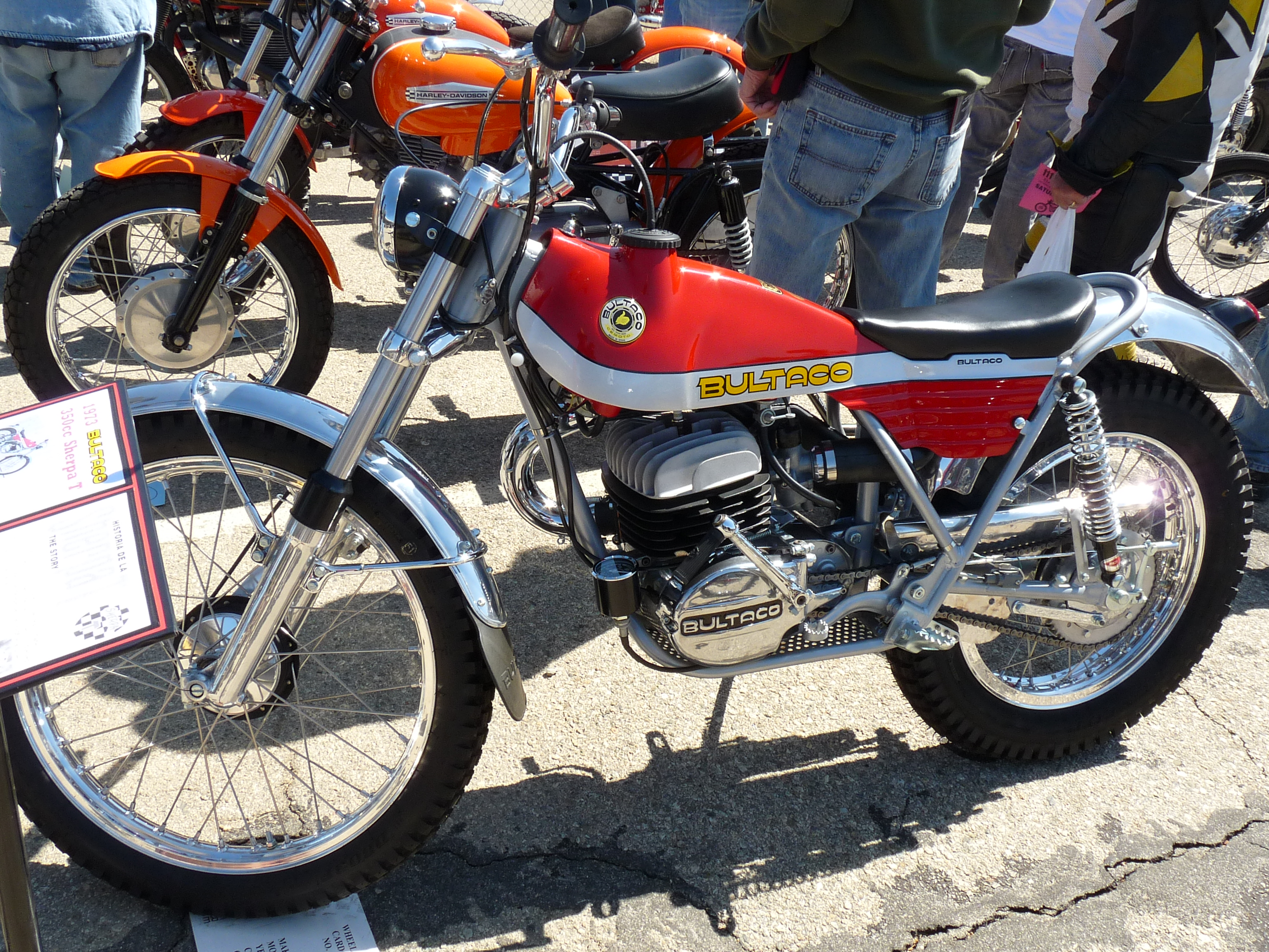 Bultaco 350 Sherpa T del 1973